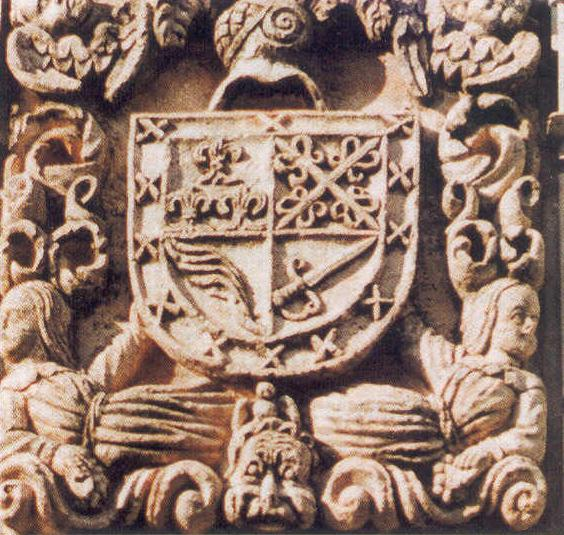 Escudo de Hidalgos vinculados a la Inquisición en San Martín de Rubiales (Burgos, España)